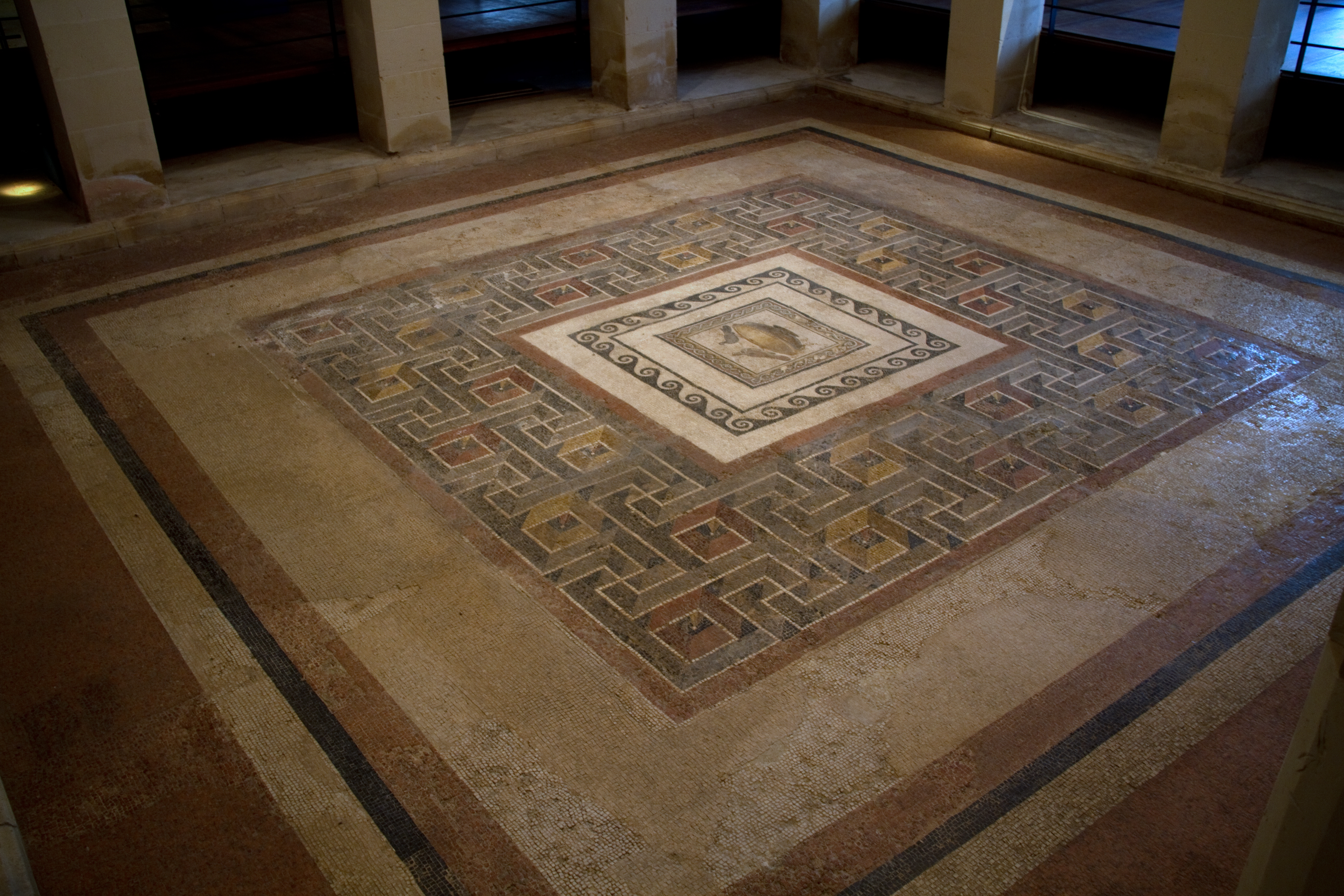 Roman Mosaic Malta 1